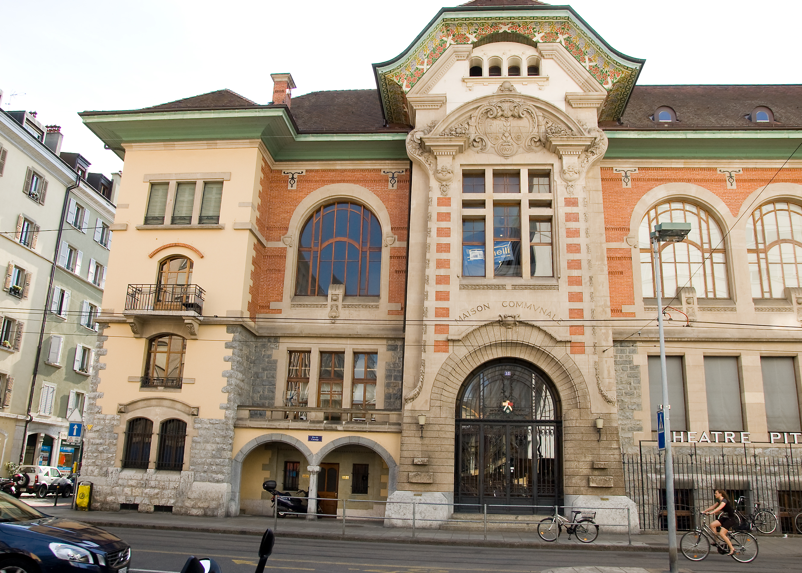 l'extérieur de la Salle communale de Plainpalais, rue de Carouge